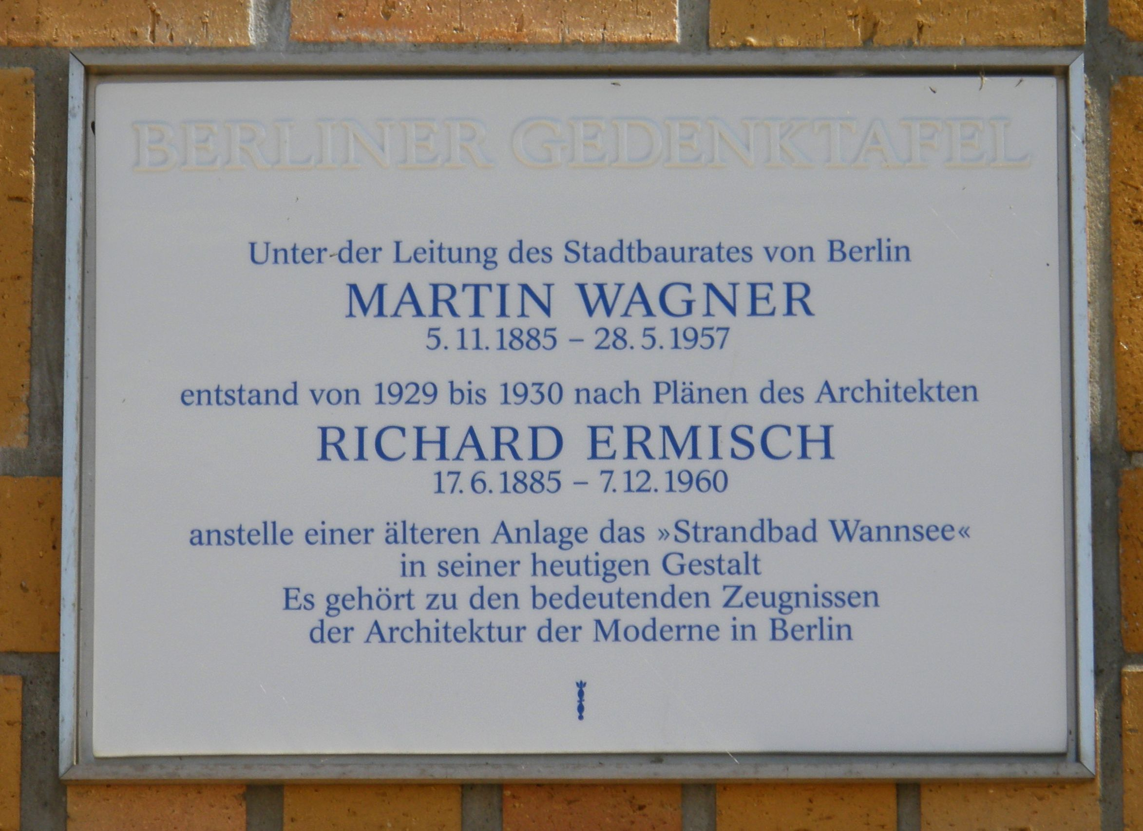 Berliner Gedenktafel für Martin Wagner und Richard Ermisch. Im Strandbad Wannsee, Wannseebadweg, Berlin-Nikolassee. Enthüllt am 12. Mai 2007.